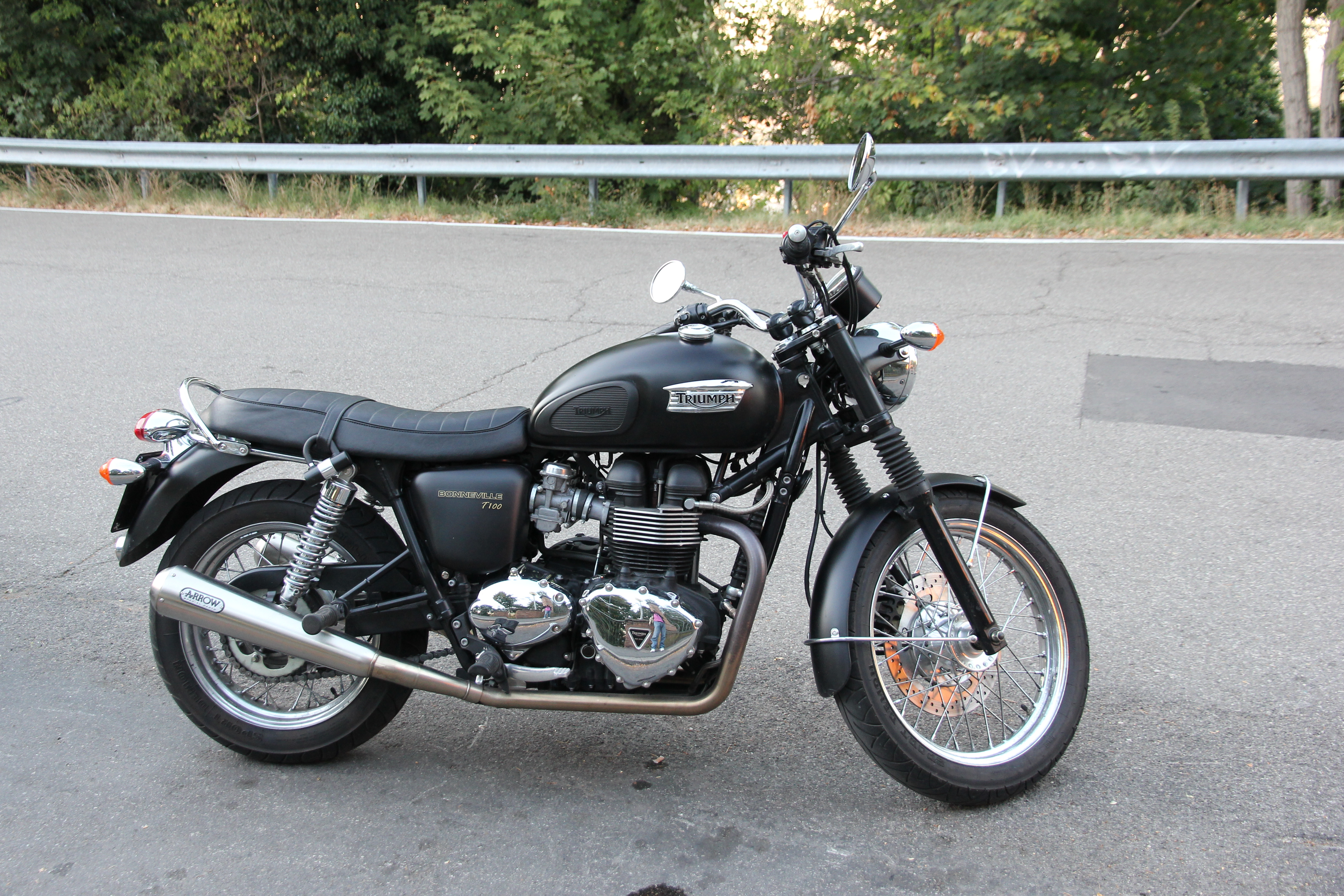 Triumph Bonneville T100